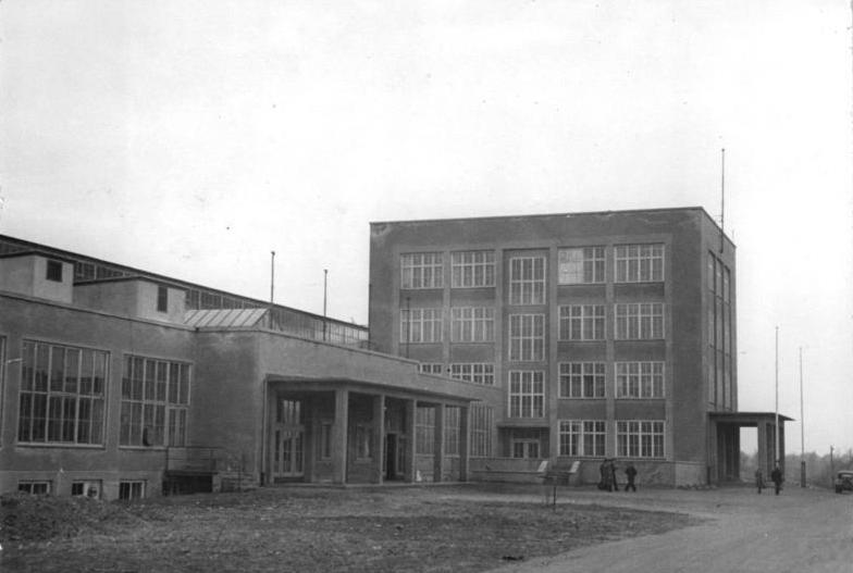 Chemnitz, Fräsmaschinenwerk "Fritz Hecker" Zentralbild Quaschinsky 27.4.1953 Die Werktätigen des volkseigenen Fräsmaschinenwerkes "Fritz Heckert" in Karl-Marx-Stadt kämpfen um fortschrittliche Normen. Bis zum 1.Mai 1953 wollen die Arbeiter des VEB "Fritz Heckert" Werkes VVB WNW in Karl-Marx-Stadt alle Arbeiten technisch begründete Normen schaffen und einführen. Zusammen mit den Technologen und Normbearbeitern werden anhand von Zeitmessungen Zeitdormative - das sind Mittelwerte für die sich immer wiederholenden mit der Hand durchgeführten Arbeiten - aufgestellt und mit der Zeitnormativtabelle die technisch begründete Normzeit an den einzelnen Maschinen errechnet. Jeder Arbeiter liest die neue Normzeit von der grünen Normkarte ab, auf der gneu vorgeschrieben sind: die Bearbeitungsmaschine, die Fertigungstechnik, jeder einzelne Arbeitsgang mit den technisch begründeten Normzeiten, die zu verwendenden Werkzeuge, Vorrichtungen usw. Aus der Produktion des "Fritz Heckert" Werkes. - Das "Fritz Heckert" Werk in Karl-Marx-Stadt Siegmar.